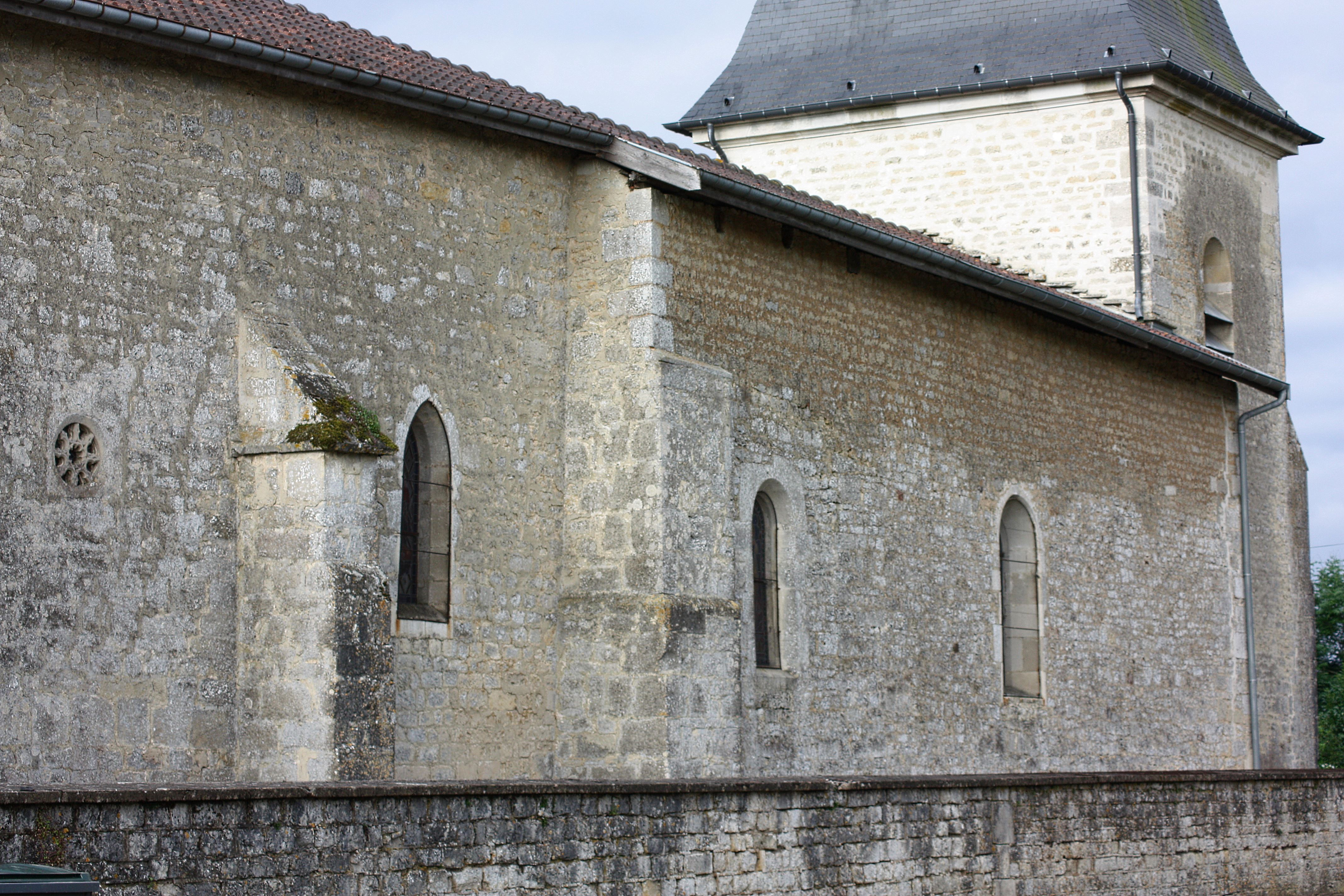 Fays - Eglise Saint-Martin